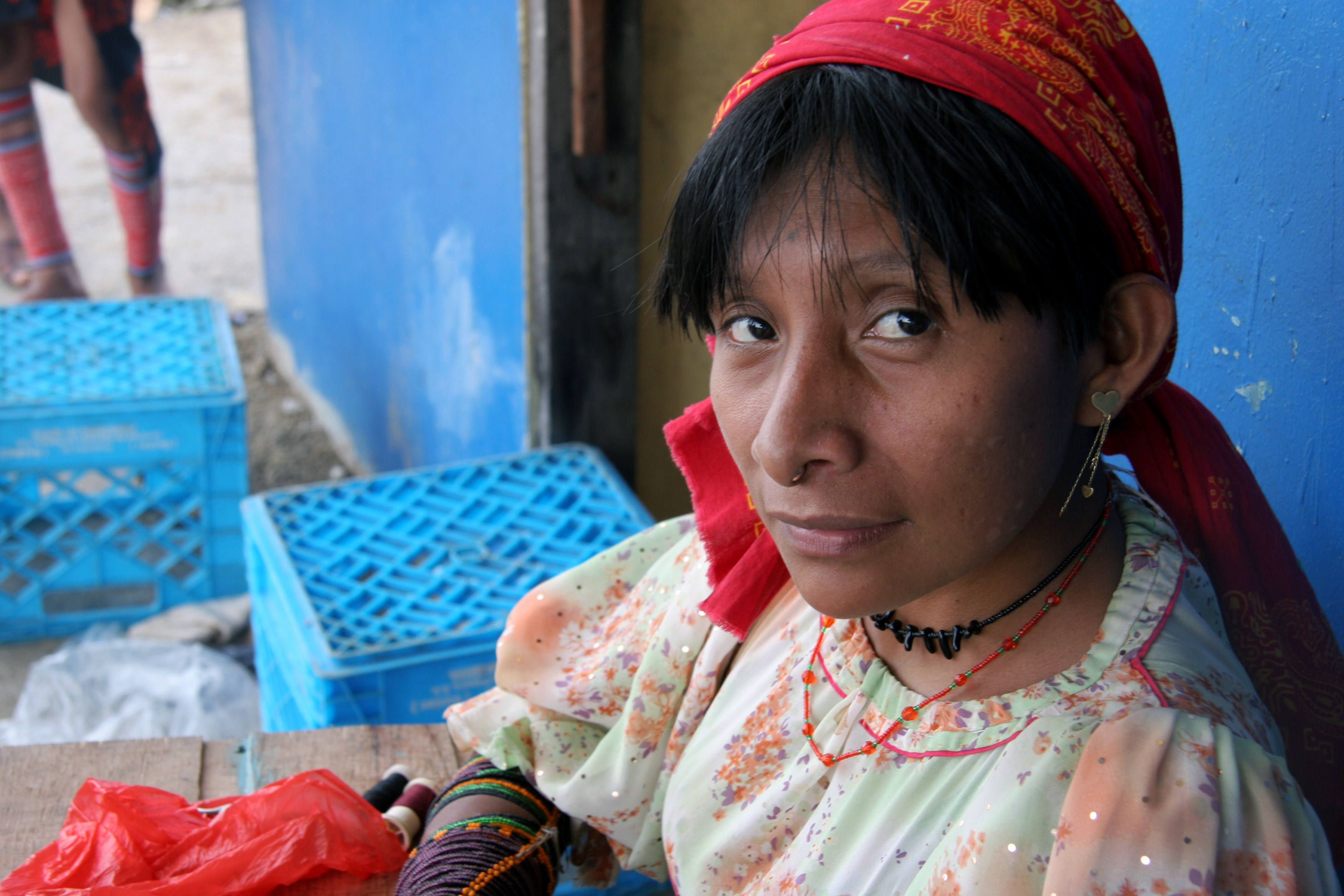 panama, iles des San Blas femme Kuna